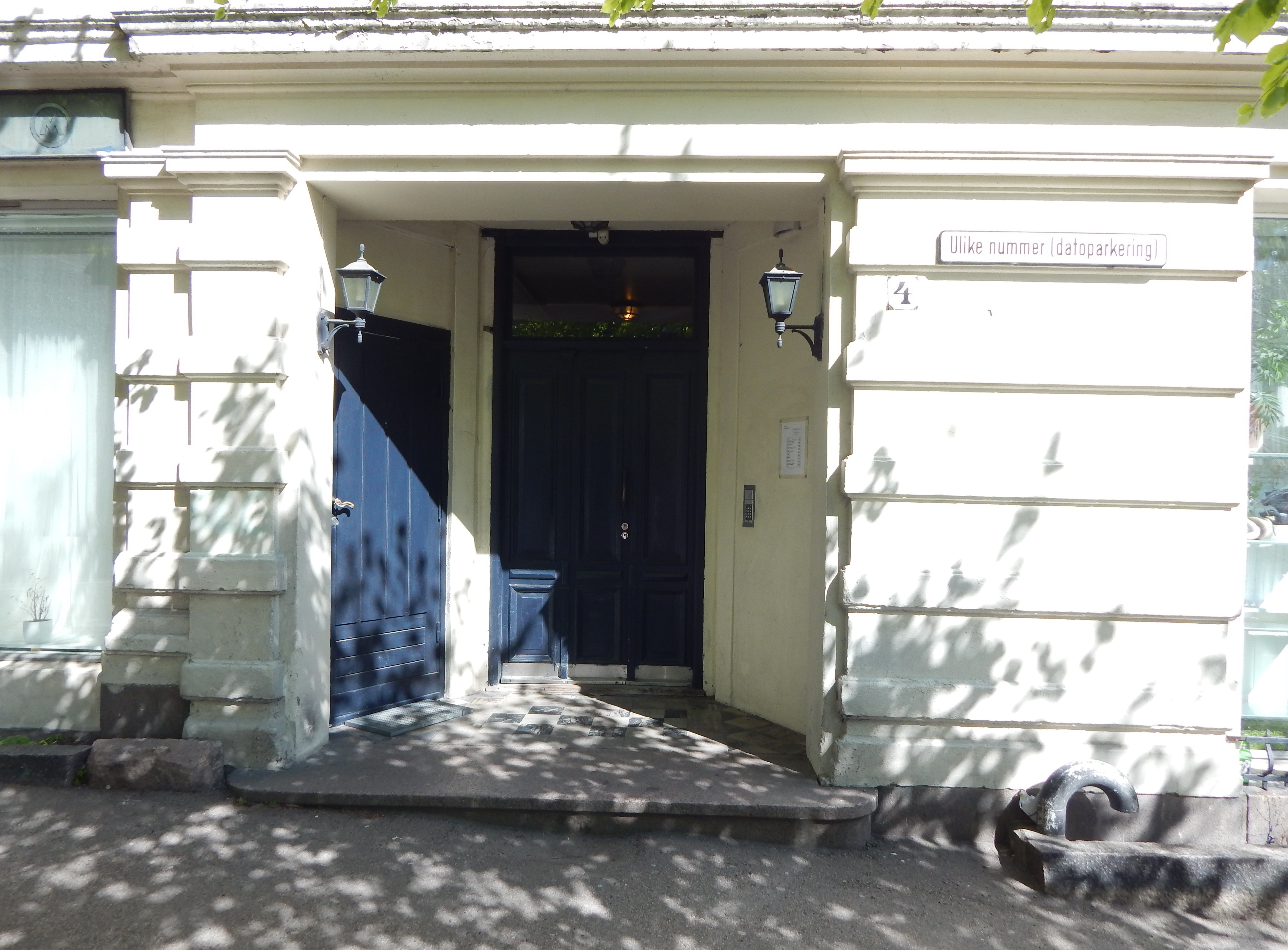 Enerhaugplassen 4, eneste adresse knyttet til plassen i dag